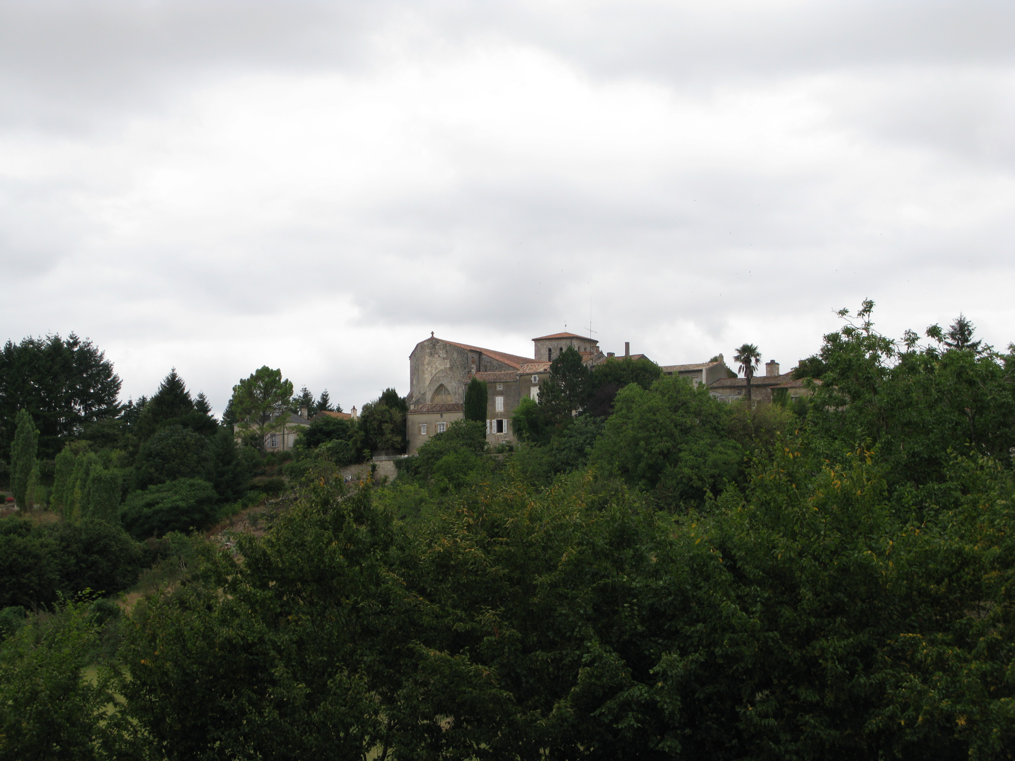 Vue générale sur Ardin